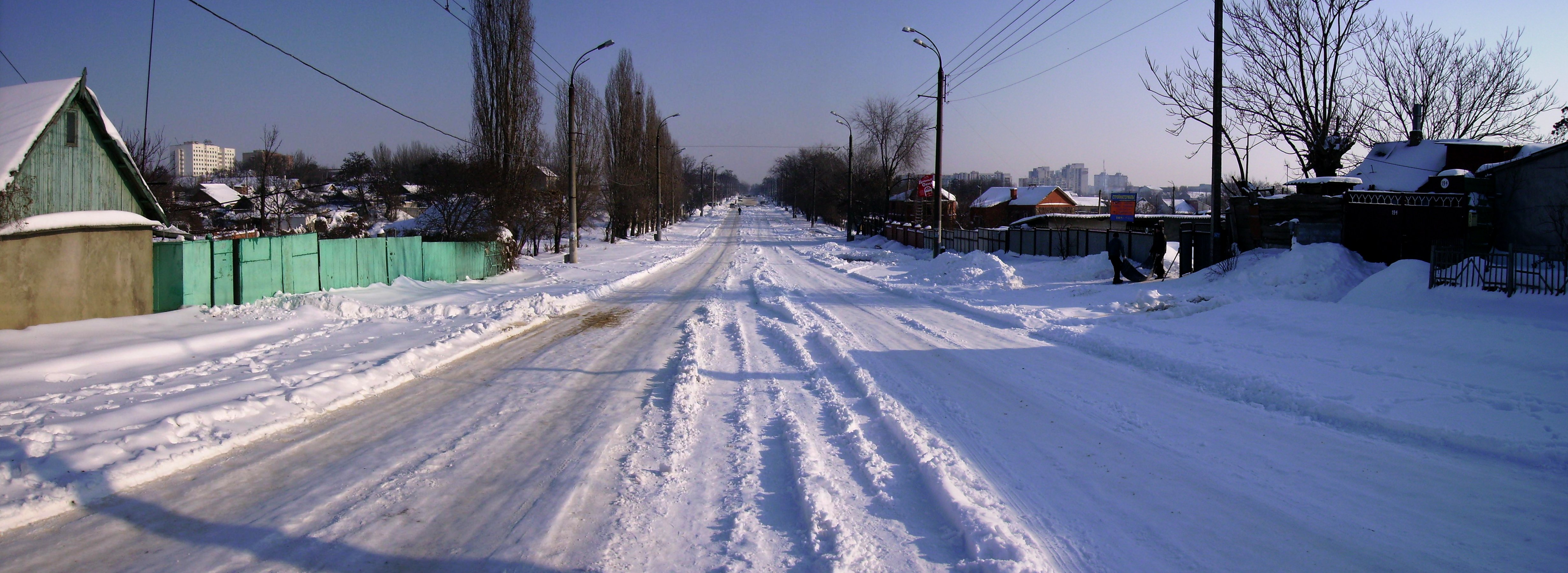 Достаточно редкий кадр. Буквально за день-два до съёмки в Тирасполе выпало много снега. Далеко не все улицы успели отчистить от него.